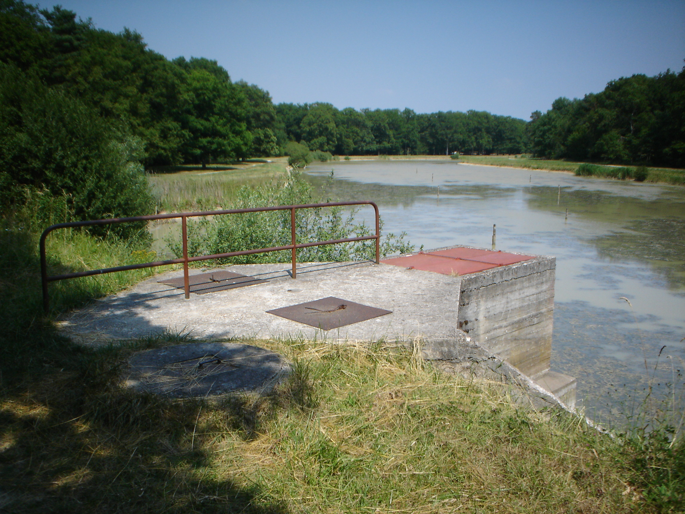 Etang de la Retrève, Forêt d'Orléans, Cercottes, Loiret